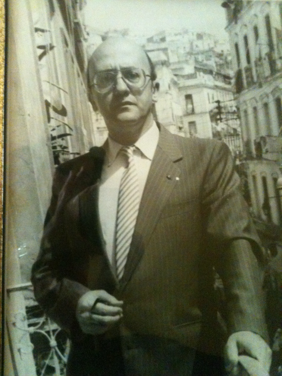 Au balcon de son cabinet à la Casbah d'Alger